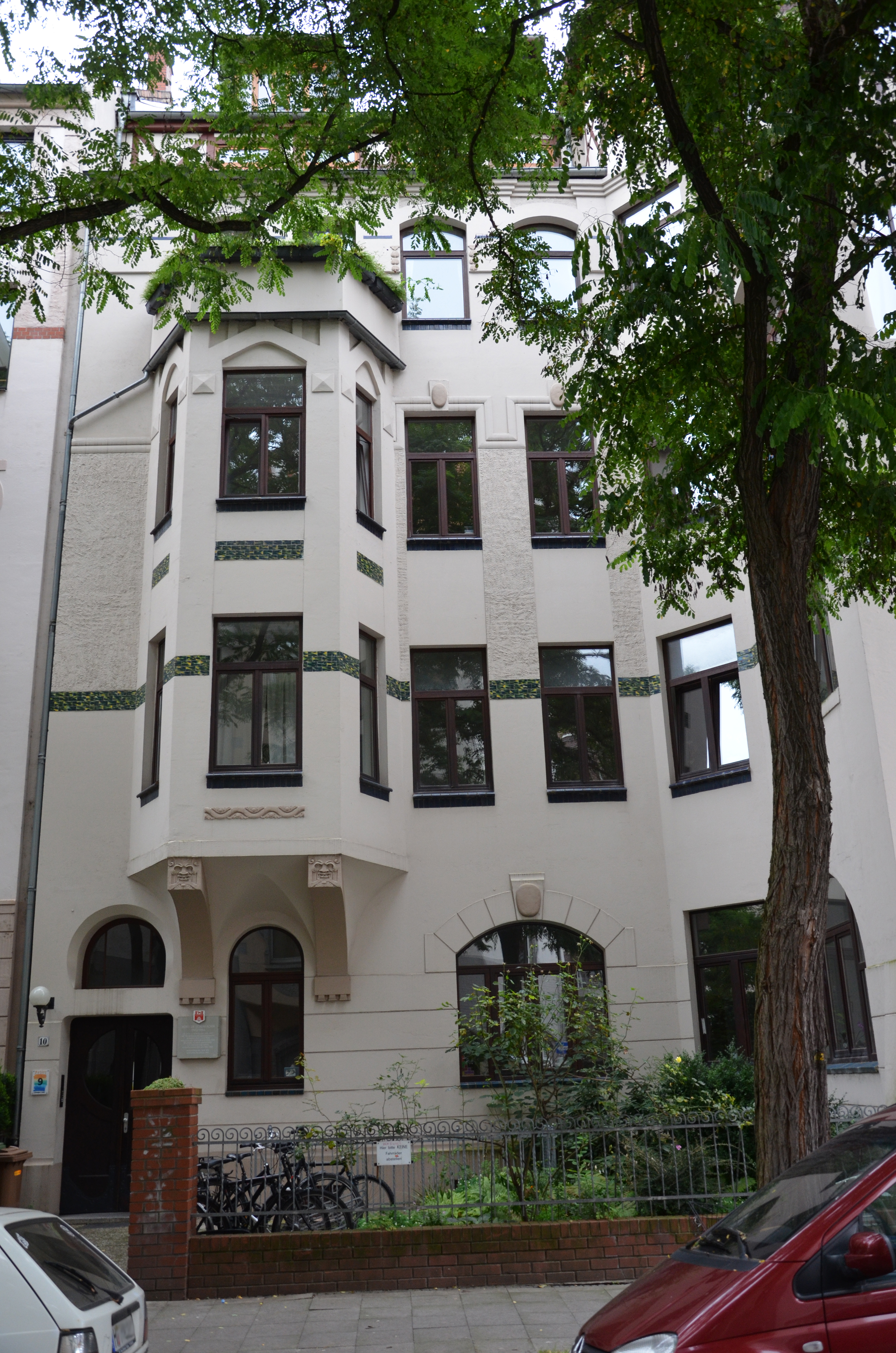 Das Büro Dr. Schumacher im denkmalgeschützten Haus Jacobsstraße 10 in Hannover im heutigen Stadtteil Linden-Mitte war nach dem Zweiten Weltkrieg noch zur Zeit der Britischen Besatzungszone vom 19. April 1945 bis zum 6. Oktober 1945 das Büro des späteren SPD-Vorsitzenden Kurt Schumacher ...